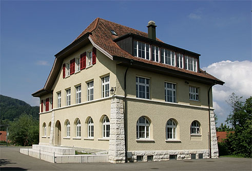 Schulhaus Wahlen